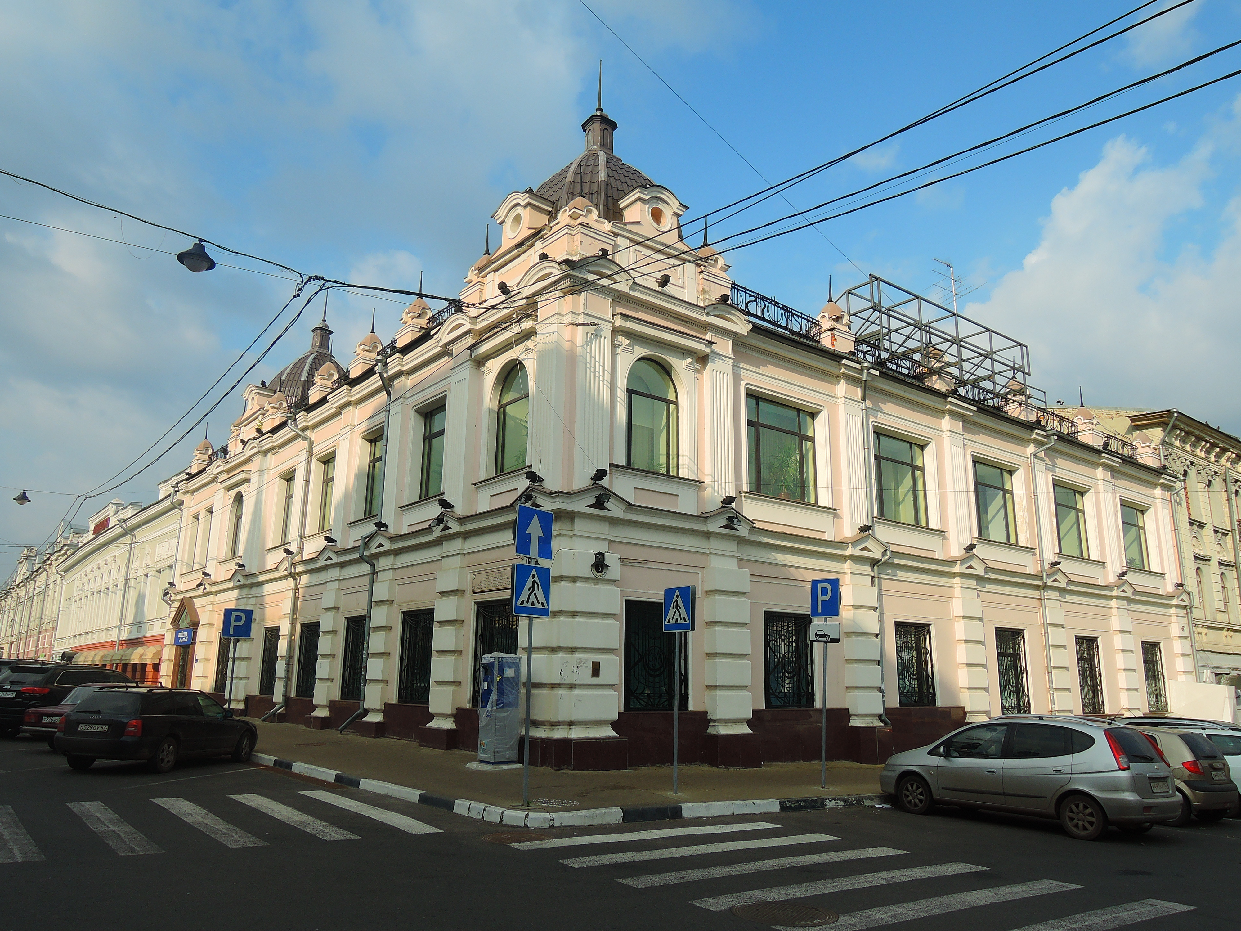 Доходный дом Блиновых: улица Рождественская, 35/5, Нижний Новгород, Нижегородская область